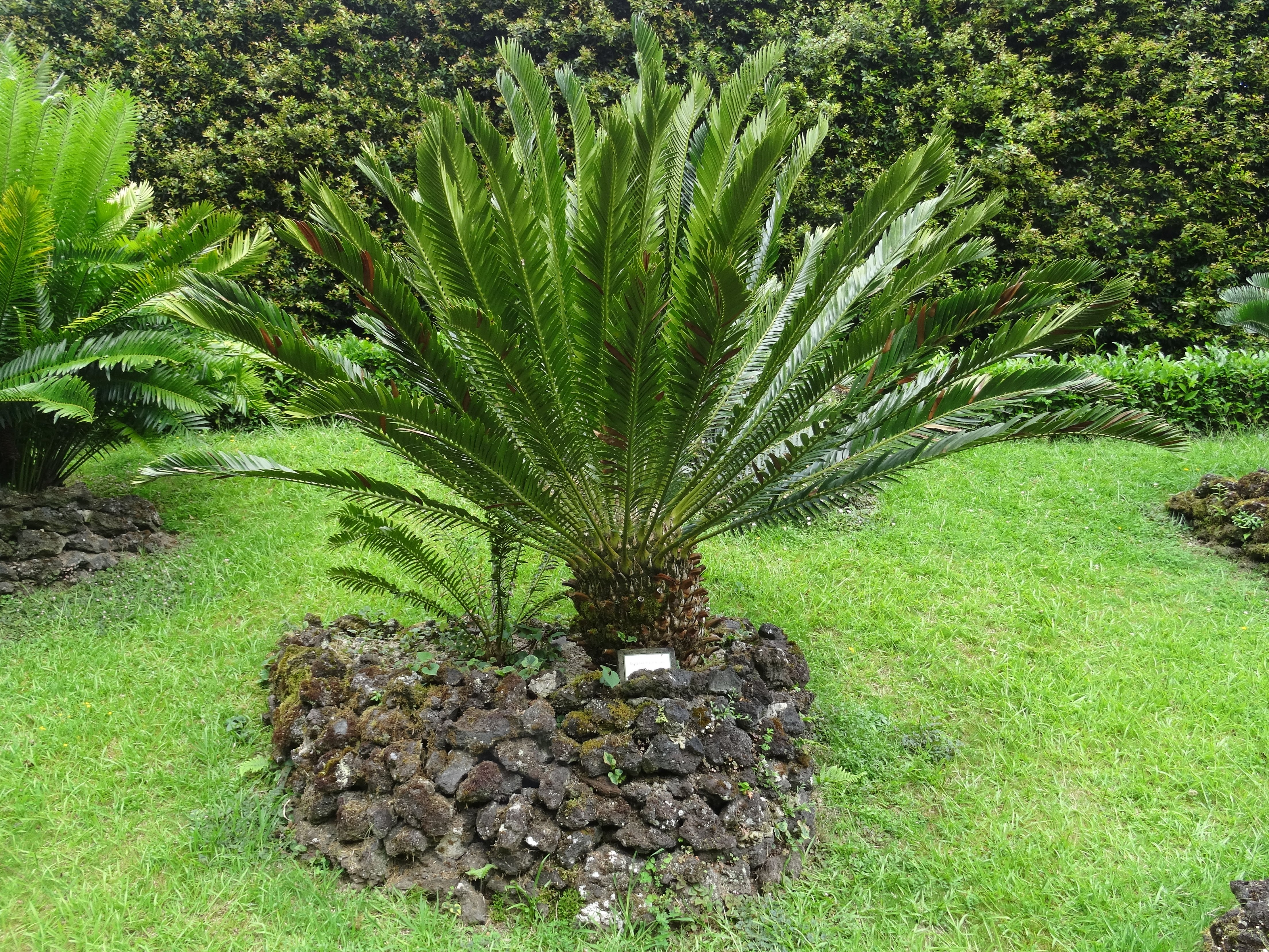 Encephalartos aemulans, Parque Terra Nostra, Furnas, Azoren